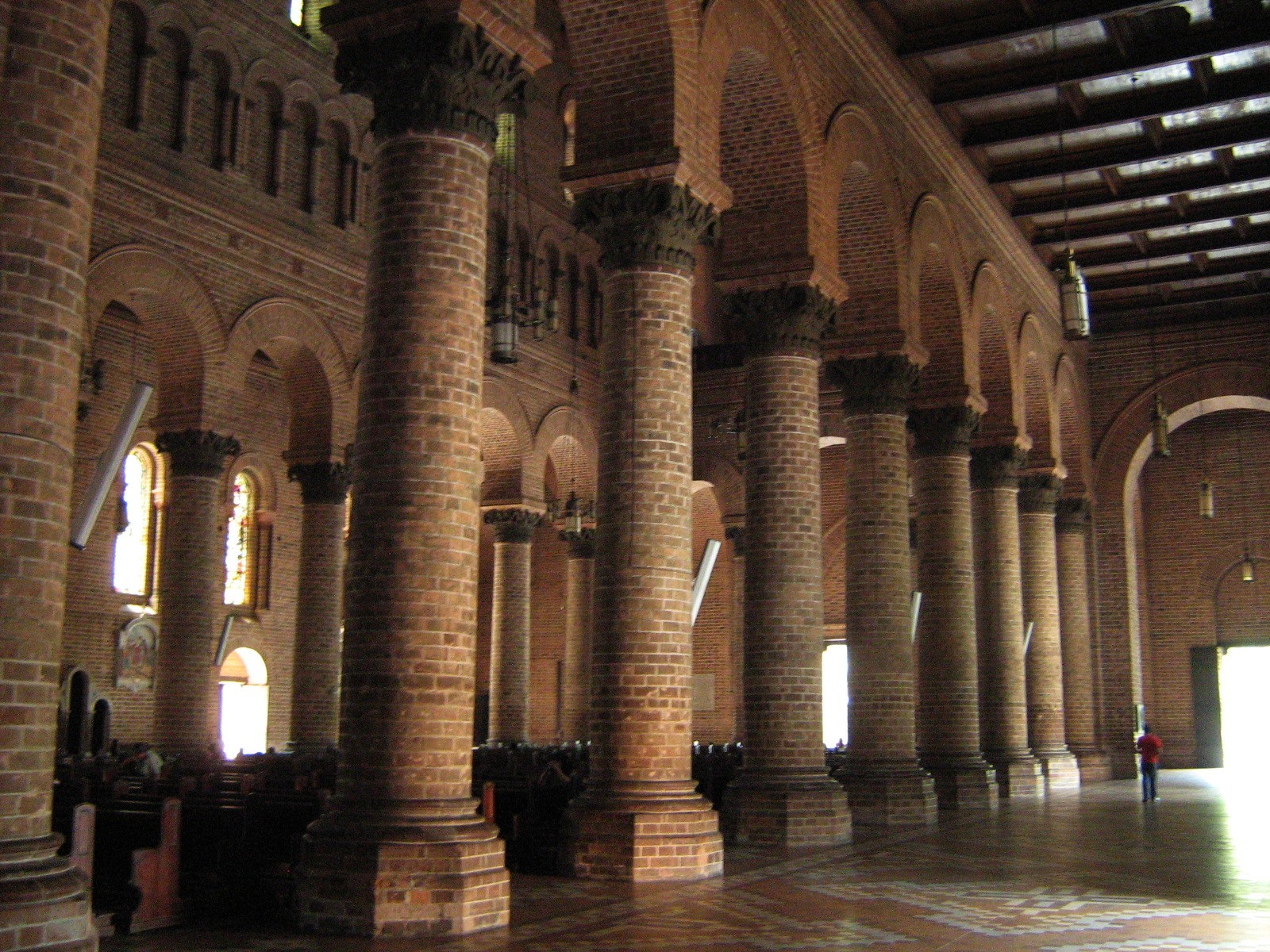 Arcada Occidental entre la nave central y lateral izquierda de la Catedral Metropolitana de Medellín. Colombia